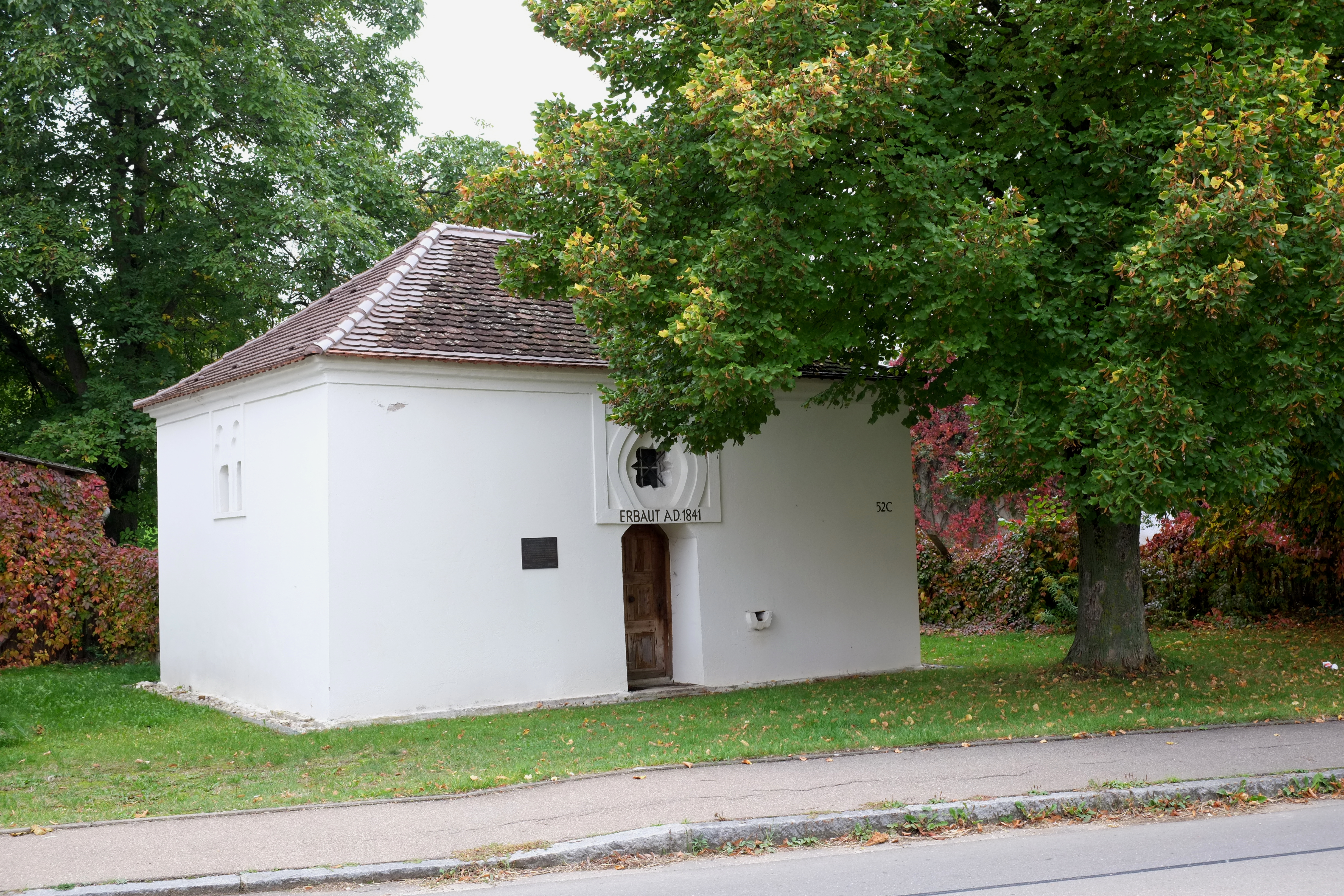 Mikwe in Mönchsdeggingen im Landkreis Donau-Ries (Bayern/Deutschland)